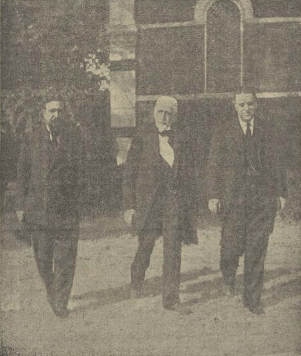 Don Alfonso Carlos y el marqués de Villores